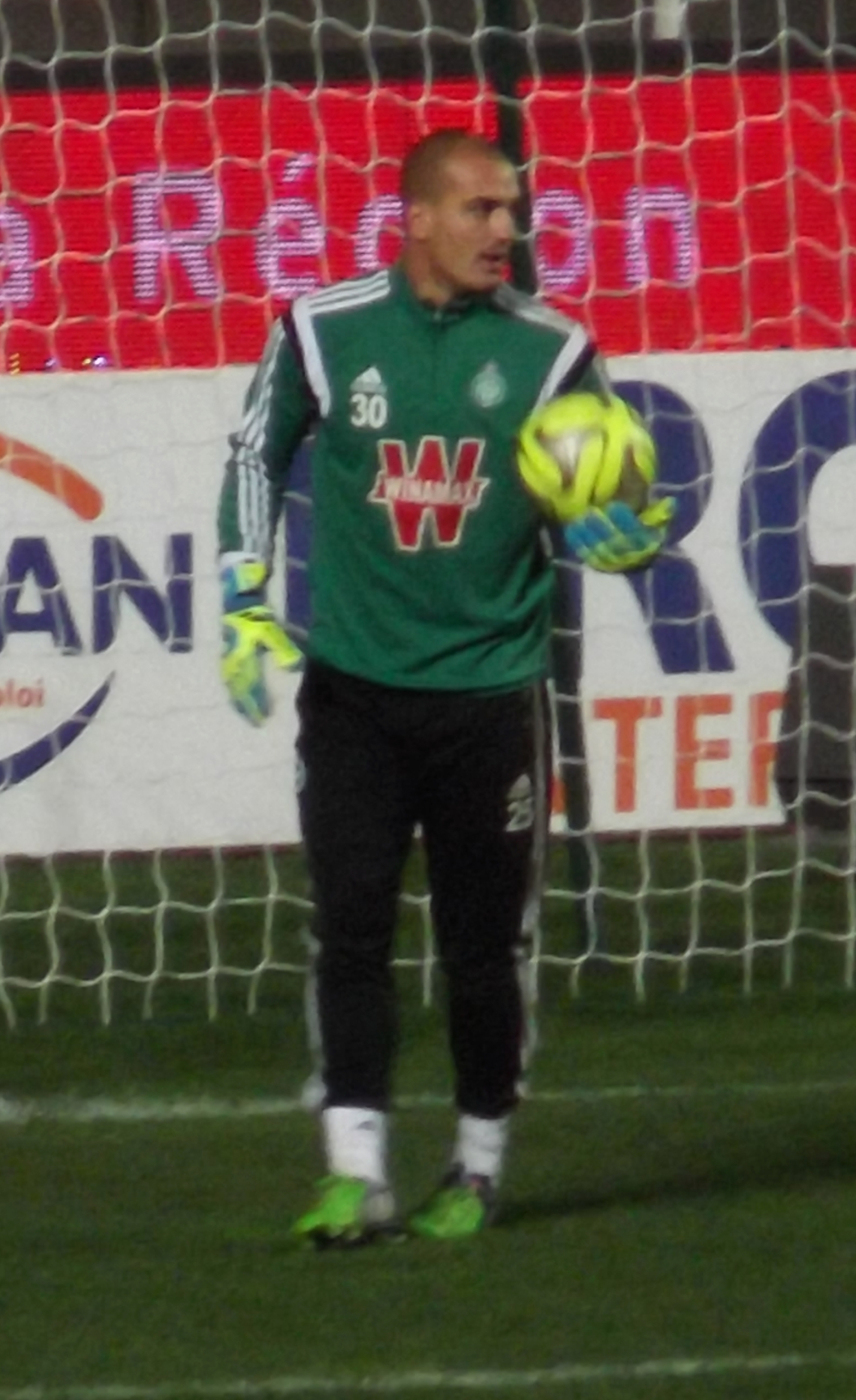 Jessy Moulin (ASSE) à l'échauffement, avant le match MHSC-ASSE.